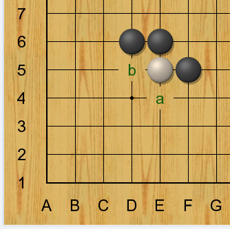 Пример позиции, где может быть применён приём ситё: ходом в пункт a чёрные захватывают белый камень. Если белые попытаются убежать в b, строится ситё и белые камни всё равно захватываются.